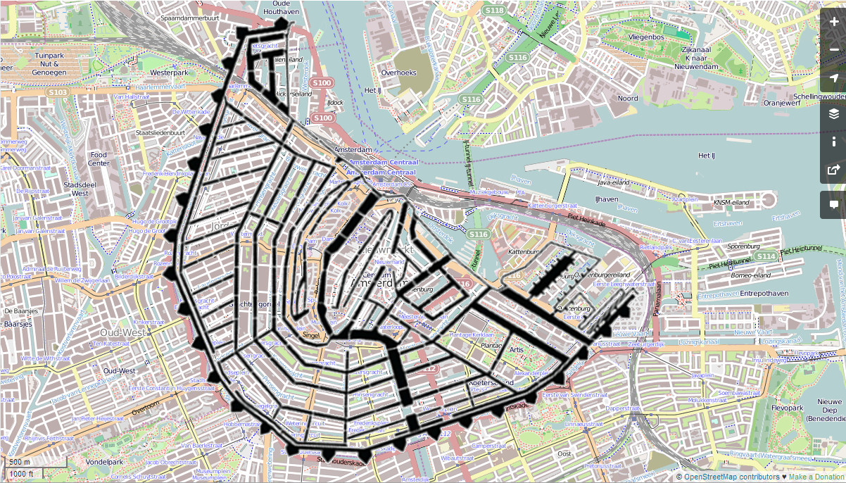 De stadsomwalling van Amsterdam geprojecteerd op een OpenStreetMap kaart van het huidige Amsterdam